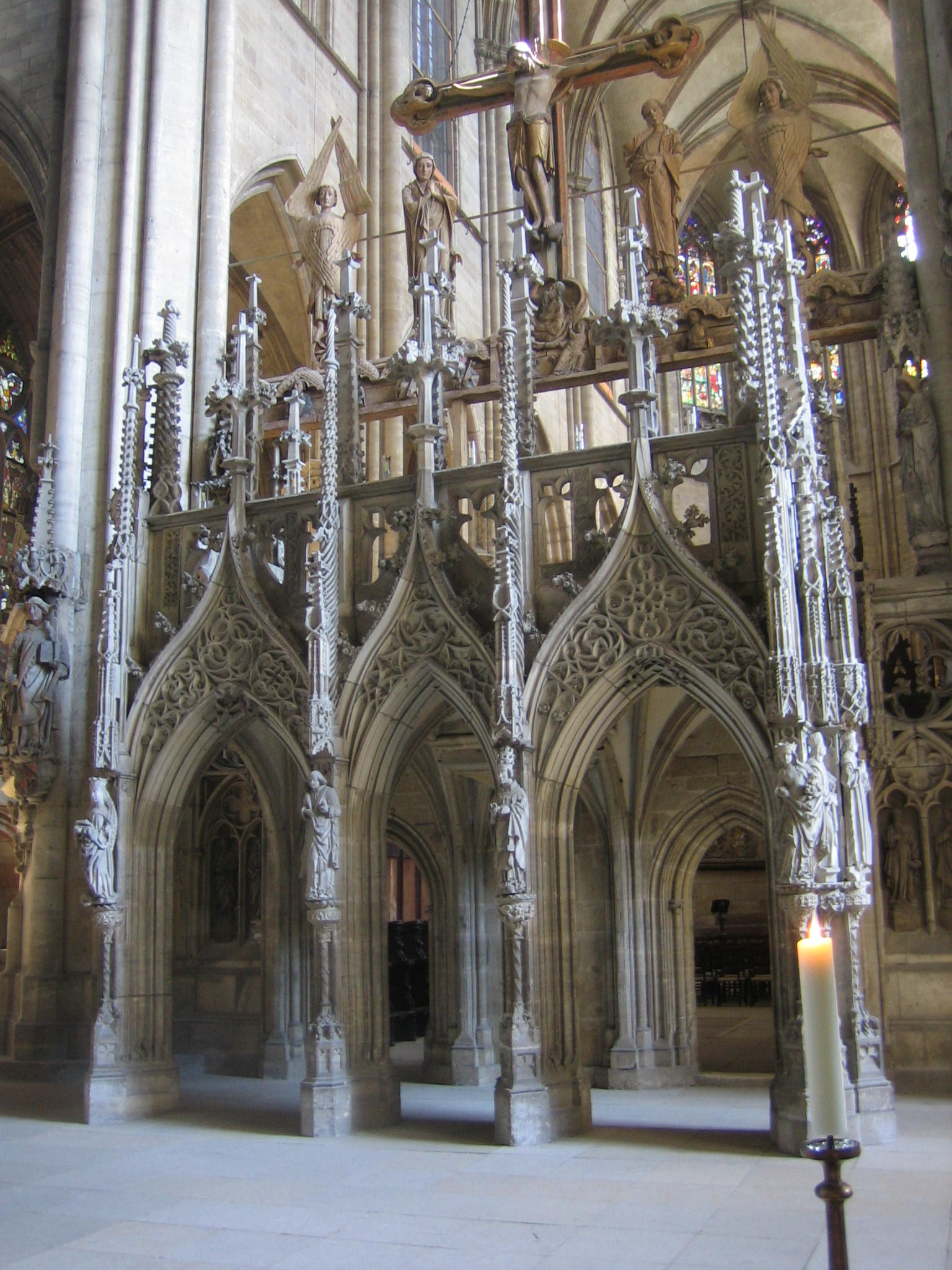 Lettner im Dom zu Halberstadt